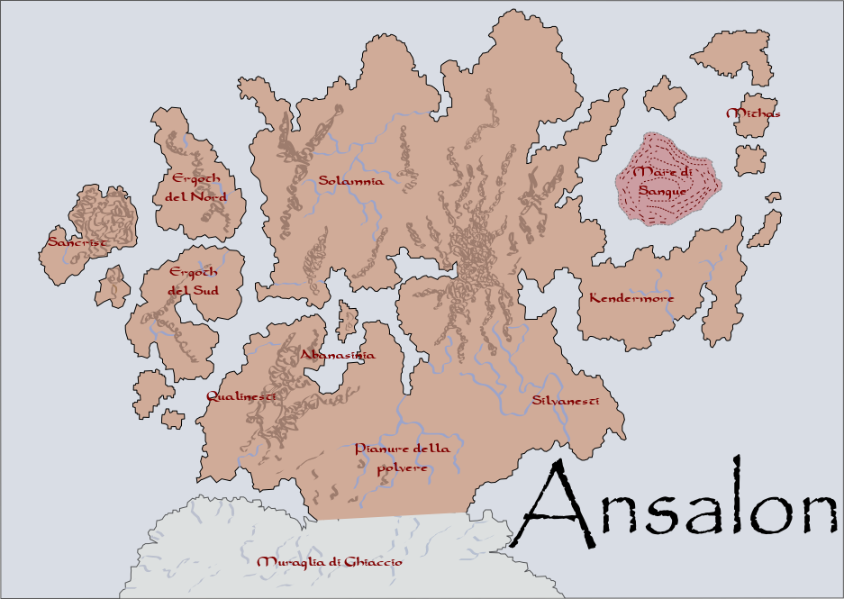 Mappa dettagliata di Ansalon con i nomi delle varie regioni